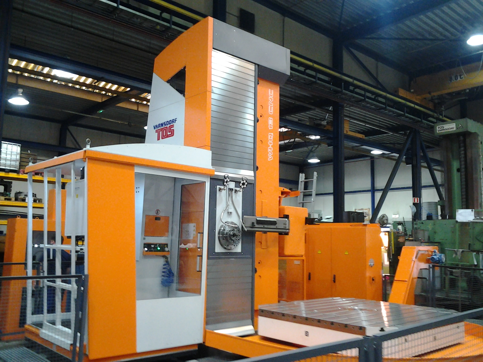 Horizontální vyvrtávačka stolová, WHQ13CNC TOS Varnsdorf